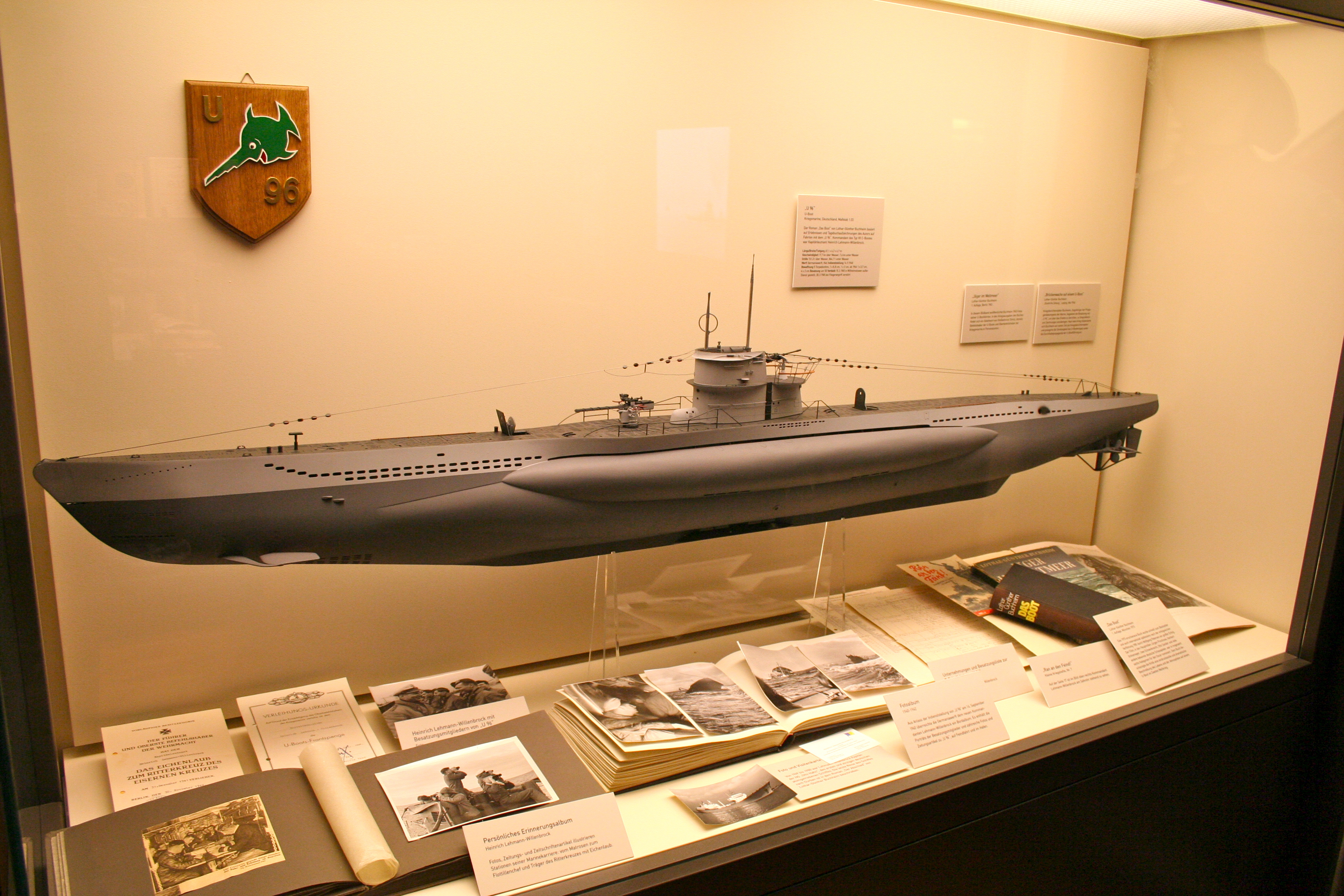 Dieses Foto wurde am 20. Januar 2010 in Hamburg-Mitte, Hamburg, HH, Deutschland mit einer Canon EOS 350D Digital aufgenommen. Es zeigt die Ausstellungsvitrine zu U-96 im Internationalen Maritimen Museum Hamburg (IMMH).